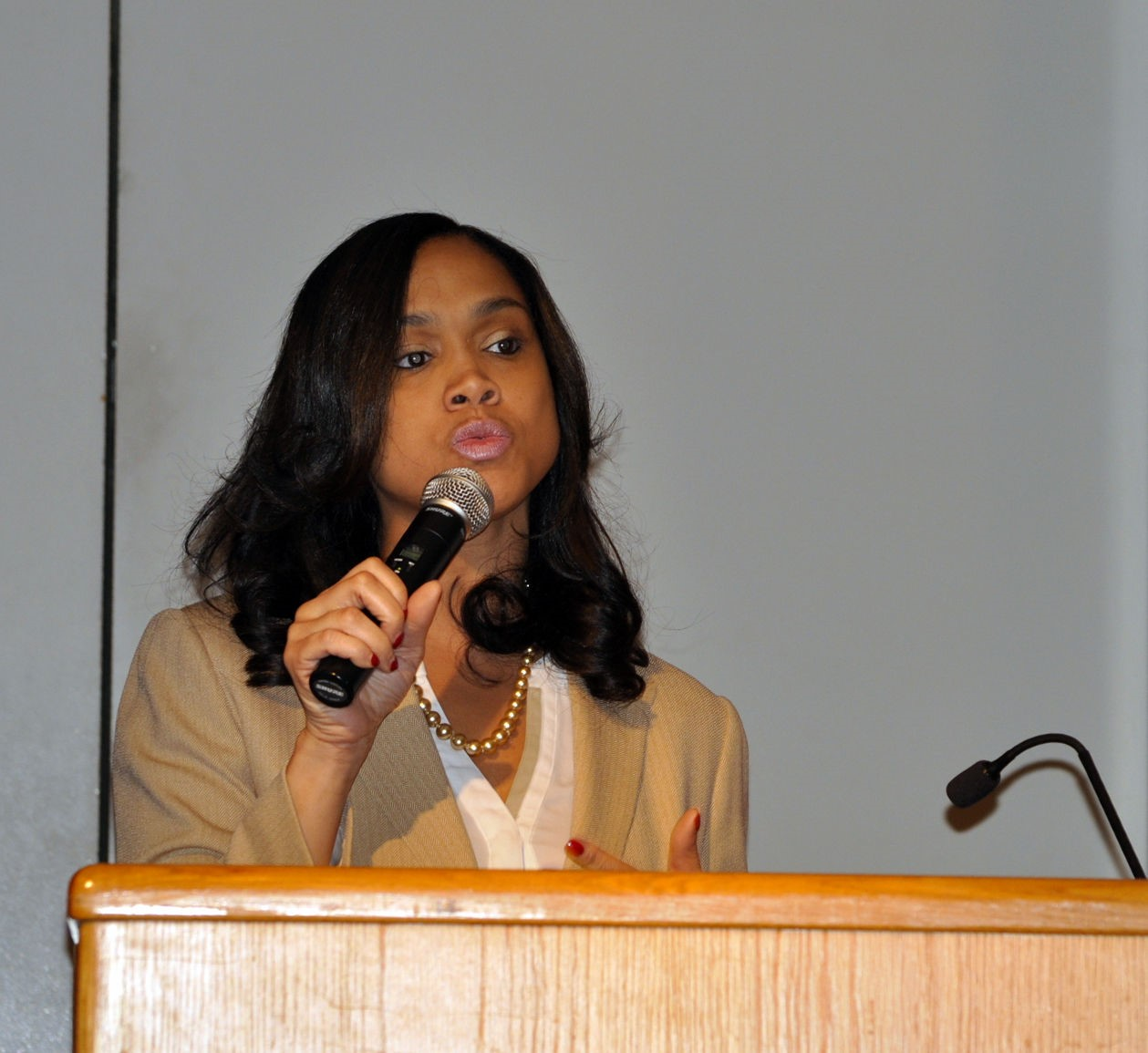 MYD 0026 Marilyn Mosby